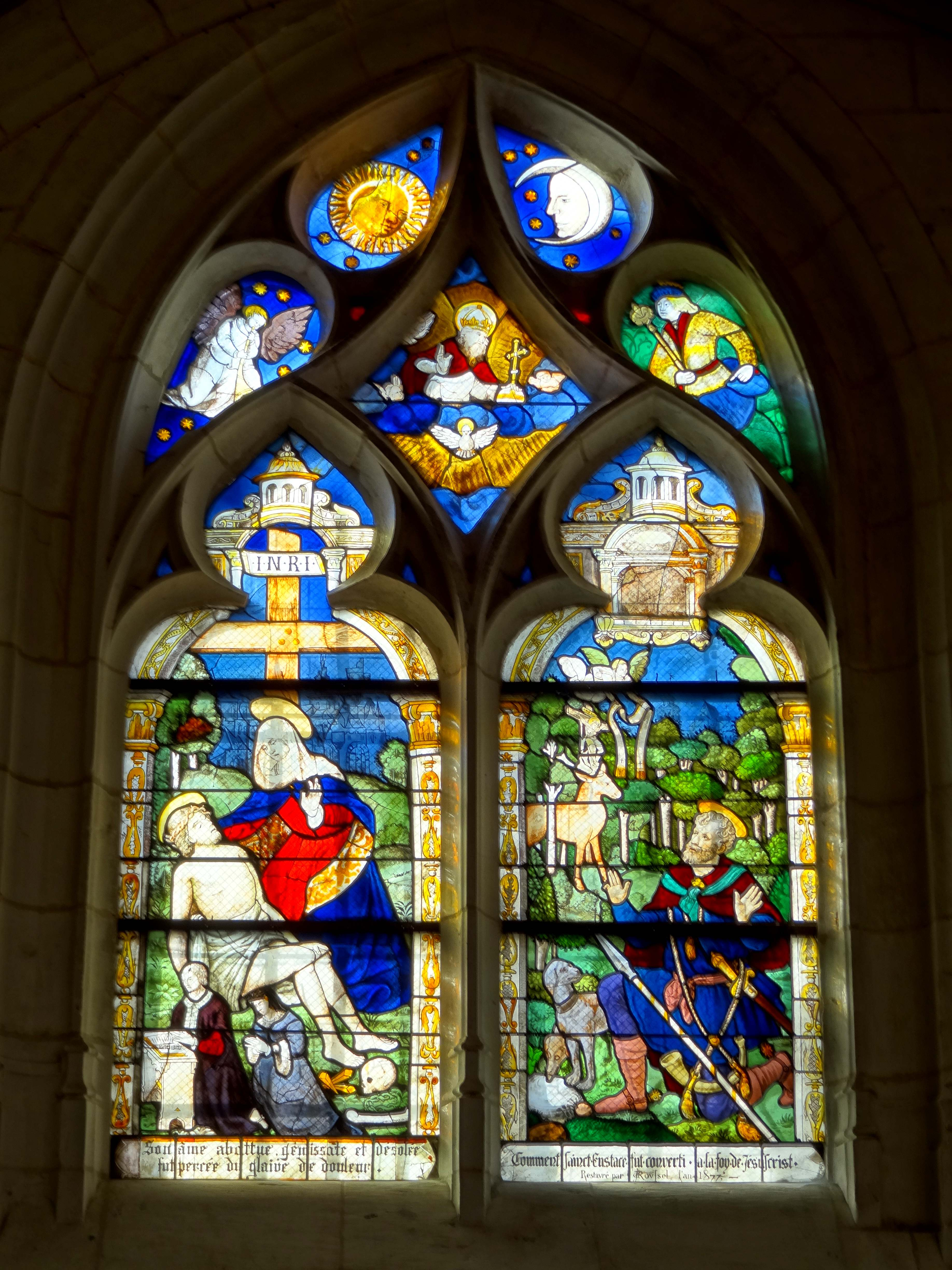 Bas-côté sud, 3e travée, verrière n° 4 - Pietà, conversion de saint Eustache.